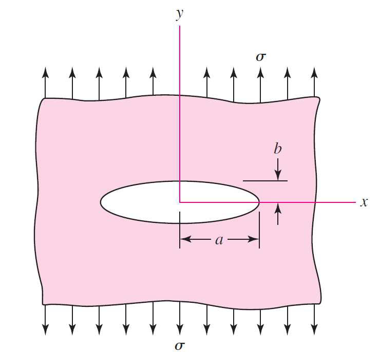 the maximum stress occurs at (±a, 0)